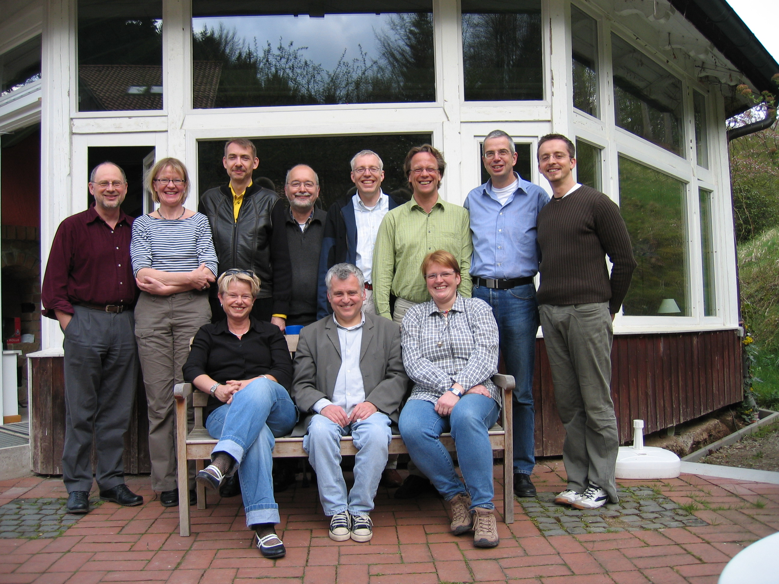 Der zuerst berufene Stiftungsrat der Akademie Waldschlösschen 2004. Von links nach rechts oben: Rainer Marbach, Monika Börding, Thomas Wilde, Michael Bochow, Joachim Schulte, Ulli Klaum, Klaus Müller, Klaus Stehling. Von links nach rechts unten: Renate Steinhoff, Hans Hengelein, Silke Eggers.